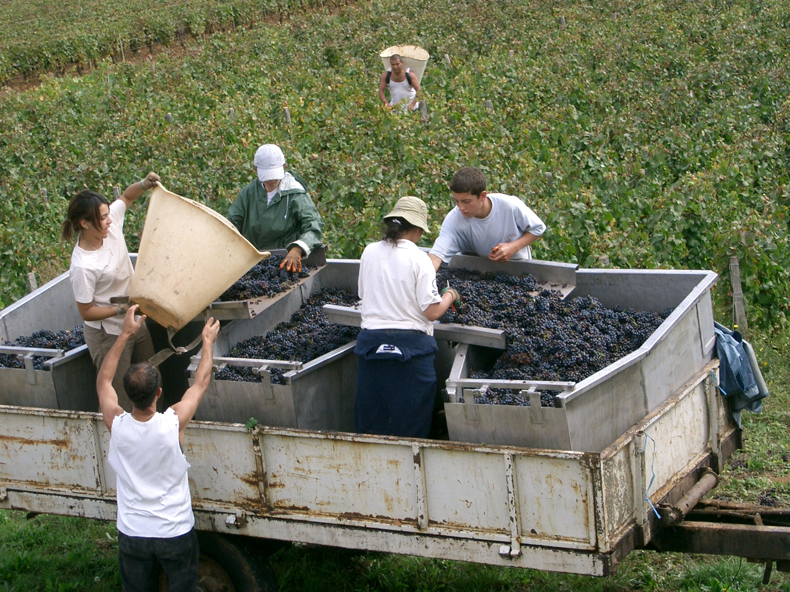 Vendanges en Bourgogne - côtes de Beaune. 23/09/2006 (hottes et transport) self made PRA